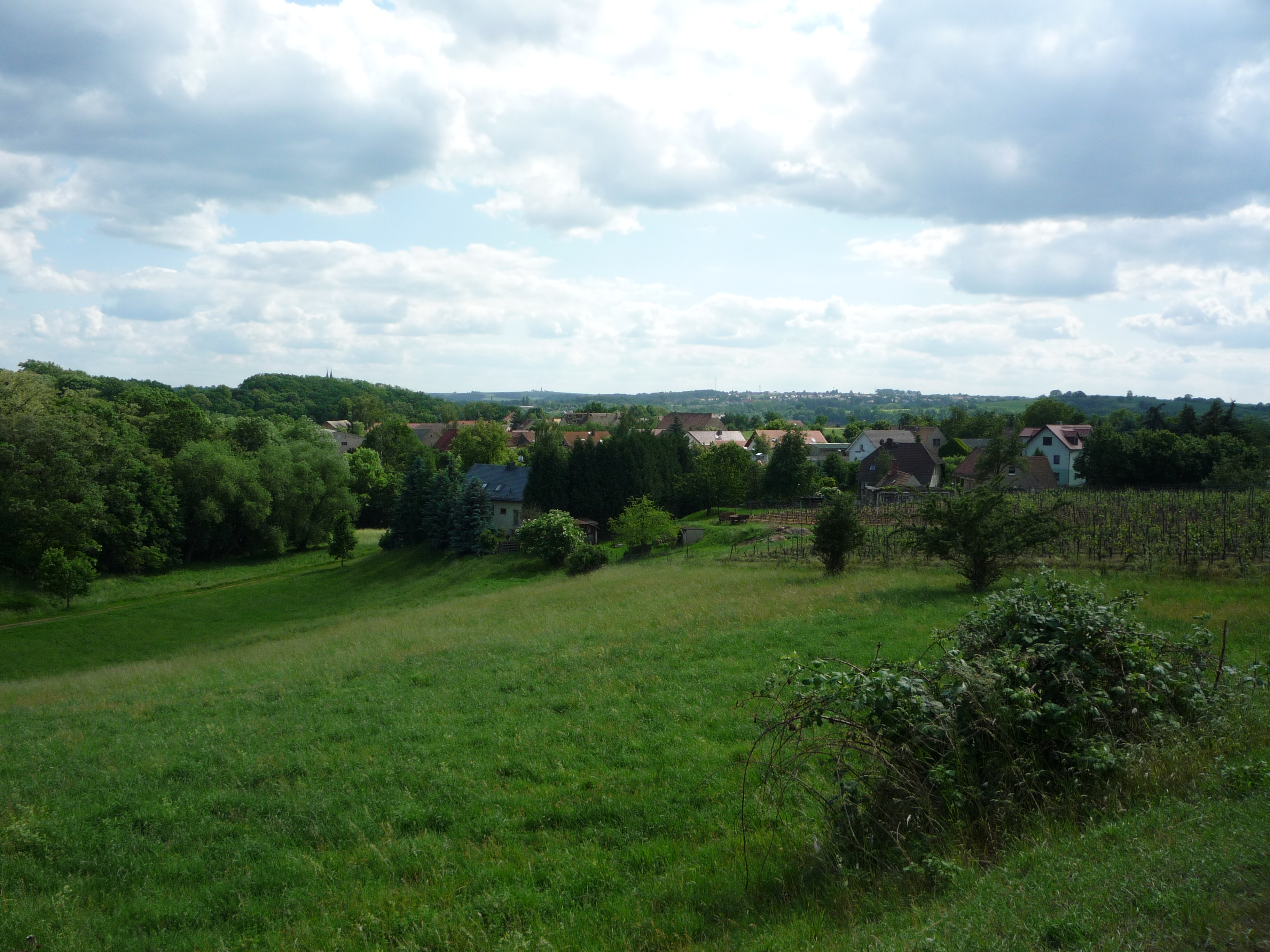 Blick auf Winkwitz von Nordost